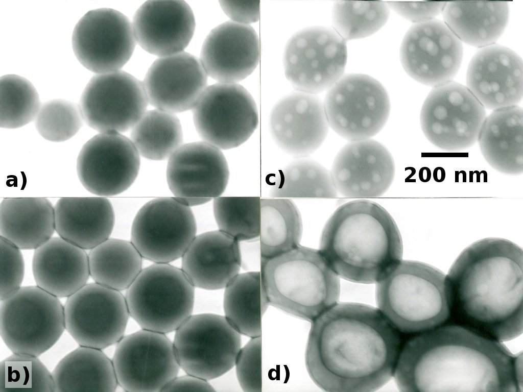 Hohllatices durch Aufquellen von Polymerpartikeln, Abhängigkeit Morphologie vom pH-Wert bei der Alkalibehandlung: a) ohne Alkalizusatz, b) pH 10, c) pH 11, d) pH 12